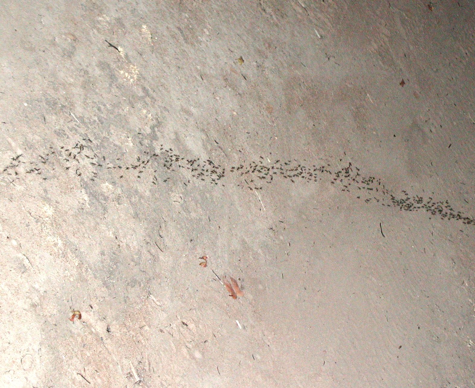 Ameisenstraße in Sambia "You can hardly expect a Fourmilab expedition to come back without any pictures of ants! Here is a column of black ants, each almost a centimetre in length, extending from their colony (invisible in the brush) to the carcass of an animal (out of the frame to the left) they were scavenging. This photo was taken by night, illuminated by the spotter's light. The carcass the ants were stripping was insufficiently illuminated to photograph and indistinguishable in any case, probably already worked over by vultures and hyenas before the arthropodal clean-up crew arrived on the scene."